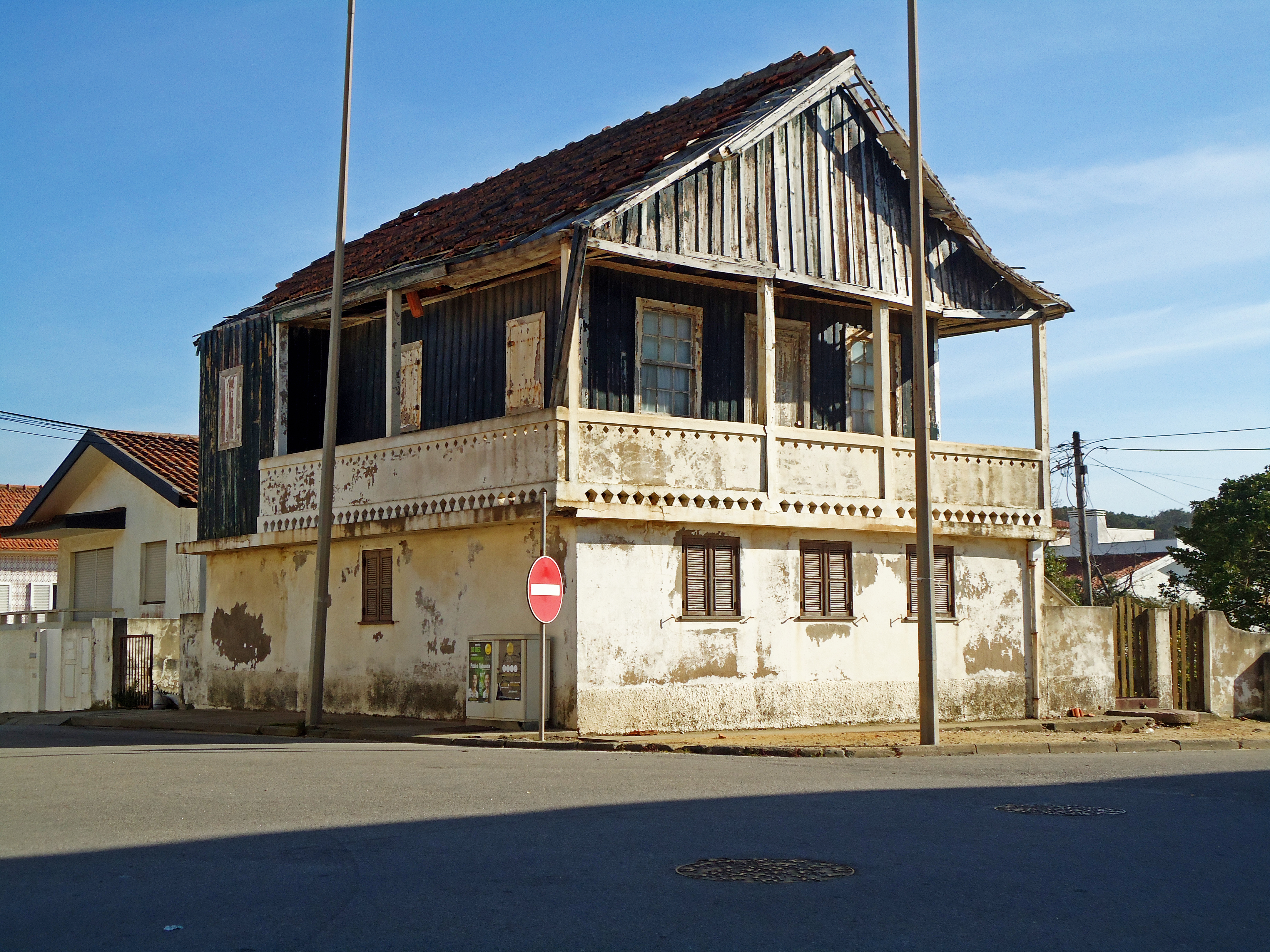 Uma casa antiga na esquina de uma rua em Esmoriz.